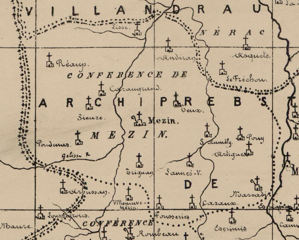 Extrèit de la mapa de la diocèsi de Condòm: Jean-Marie Cazauran (1845-1910). Diocèse de Condom au XVIIe siècle.